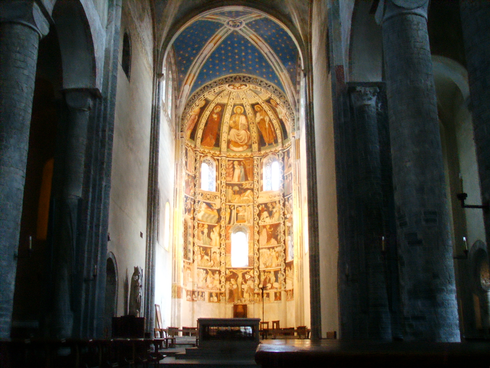 Como, basilica di sant'abbondio, cortile, interno